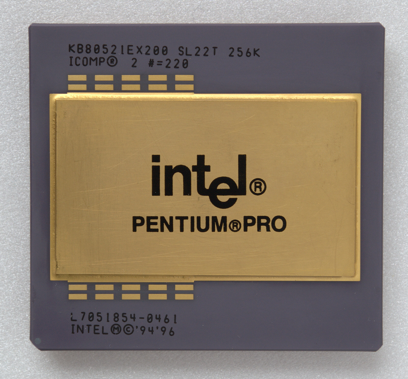 Intel Pentium Pro 200 MHz, 256kB Cache, Socket 8